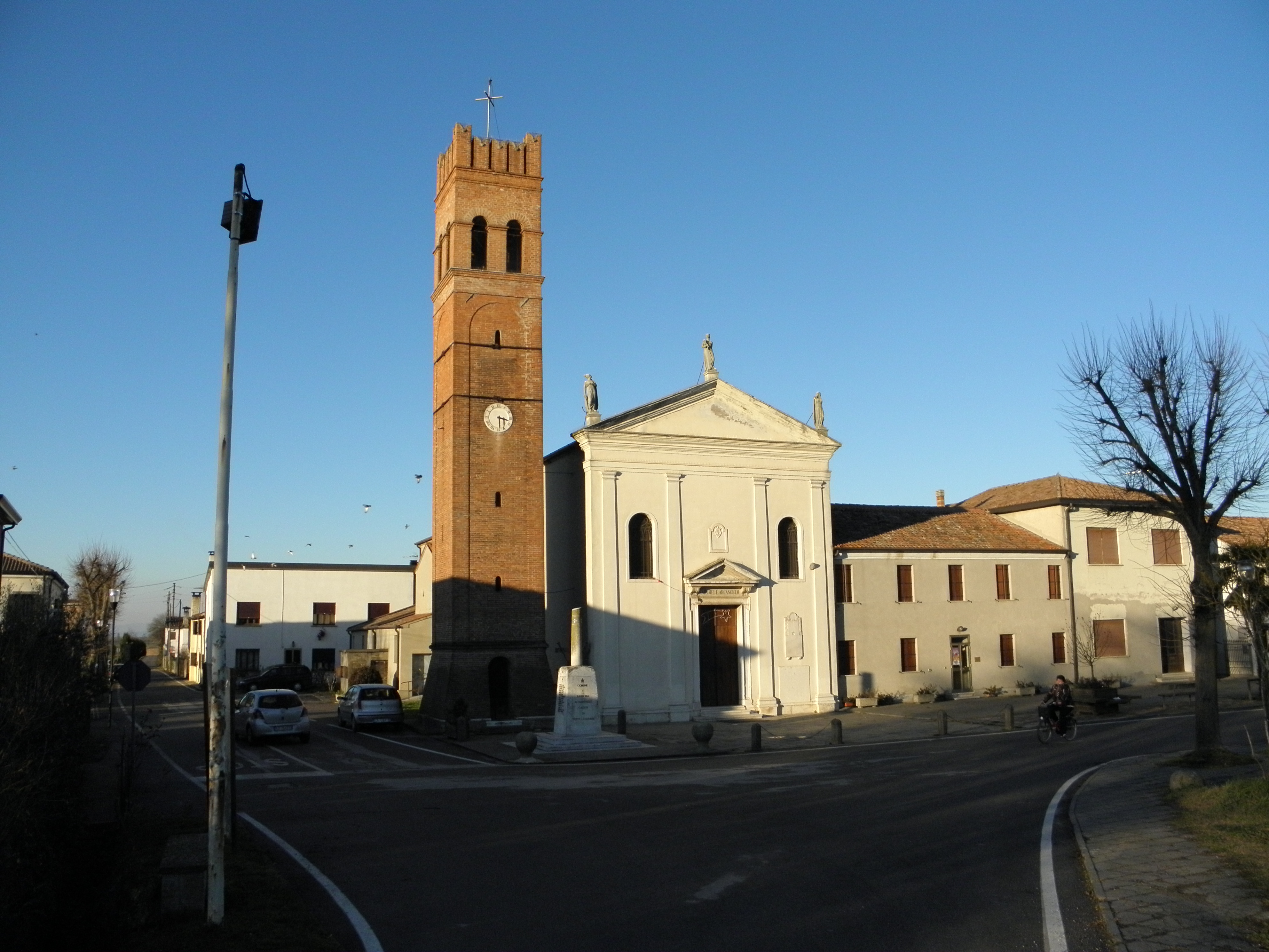 Barbona: scorcio del paese con la Piazza Aldo Moro e la chiesa parrocchiale di San Michele Arcangelo.